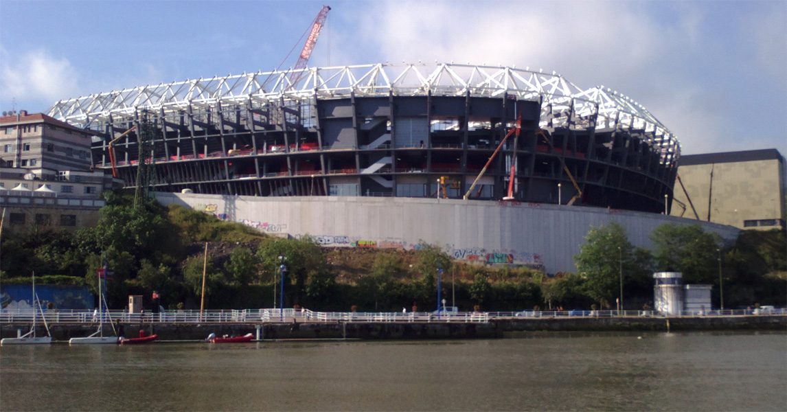 Nuevo estadio de San Mamés en construcción.